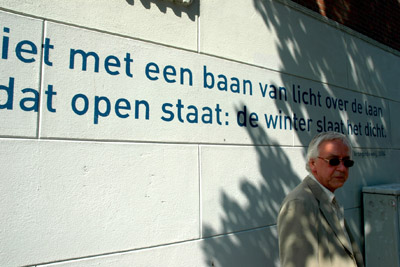 Rien Vroegindeweij voor een dichtregel in de buitenruimte. Foto gemaakt door een bekende van de persoon op de foto.